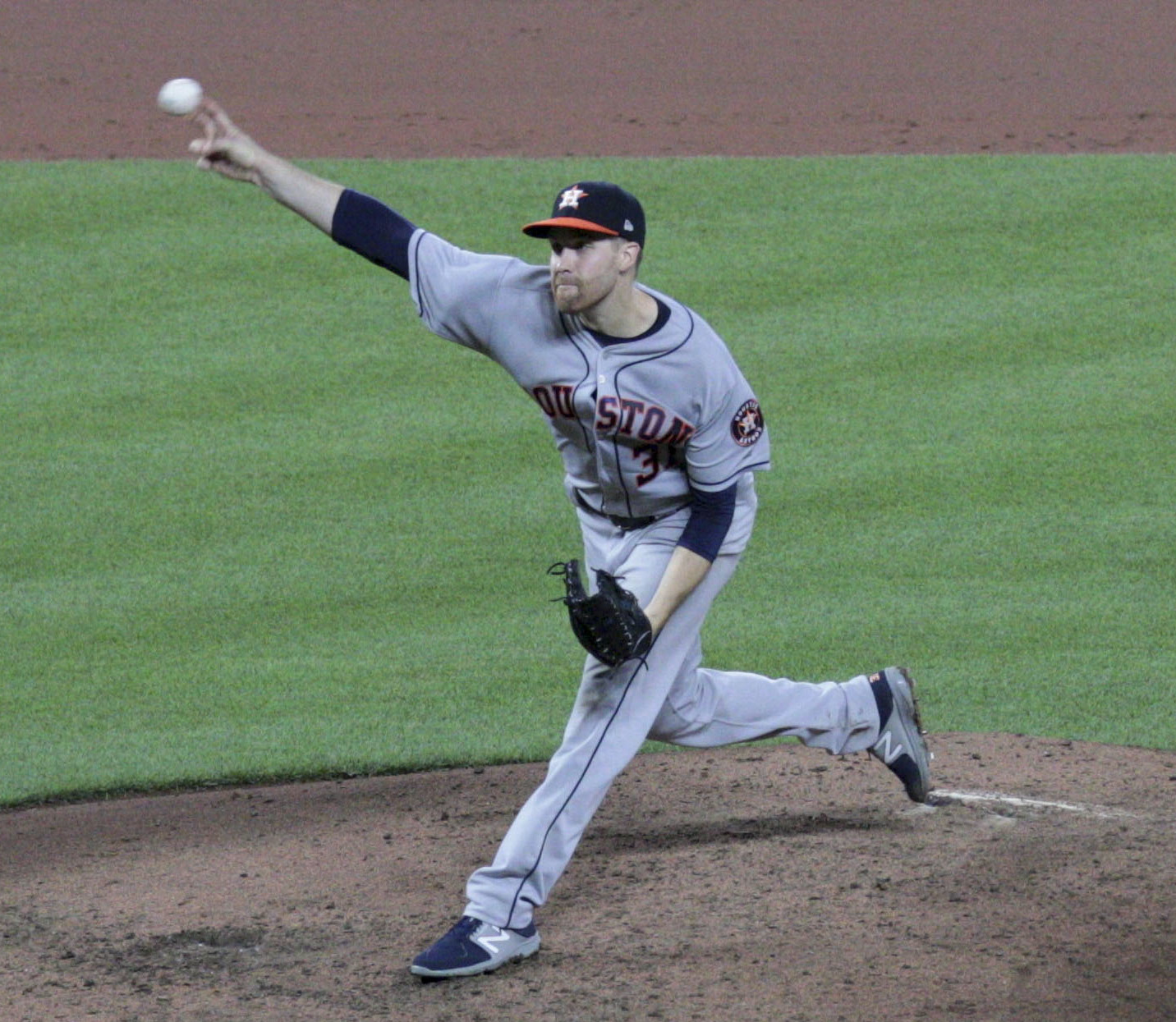 Astros at Orioles 7/22/17